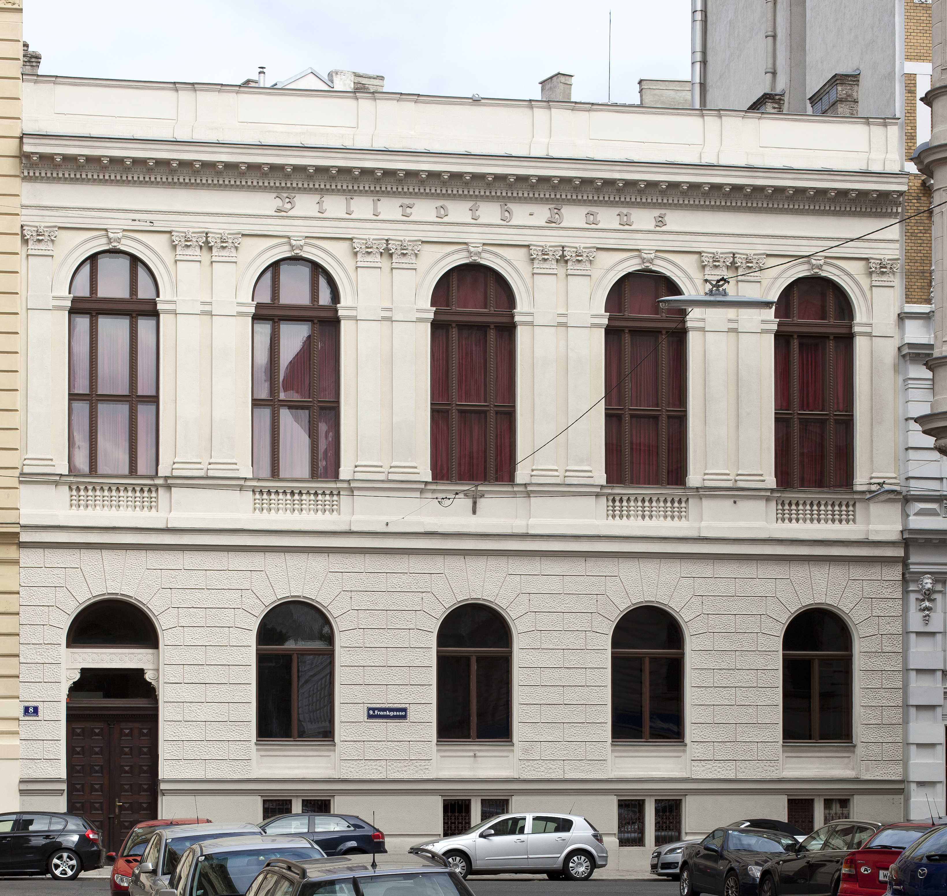 Frankgasse 8, 1090 Wien